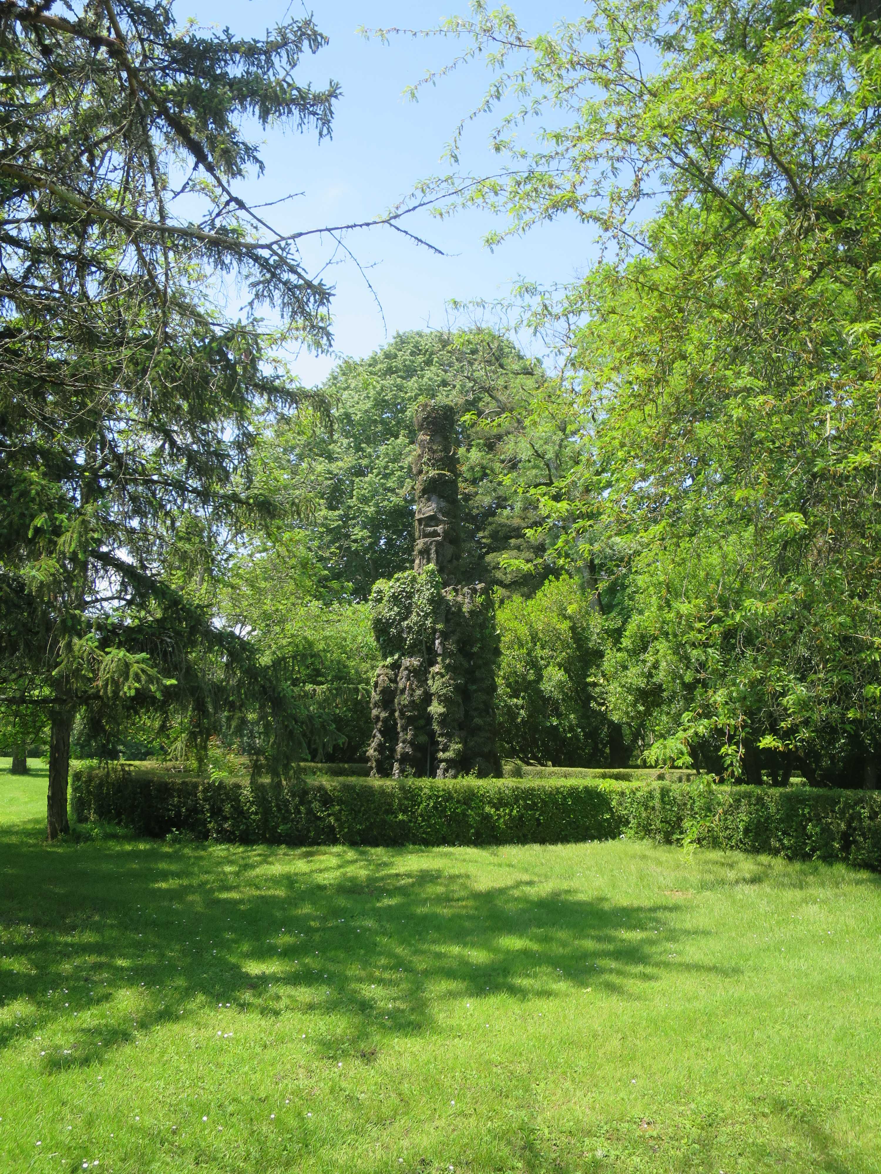 Villa Lebrun, Marssac-sur-Tarn